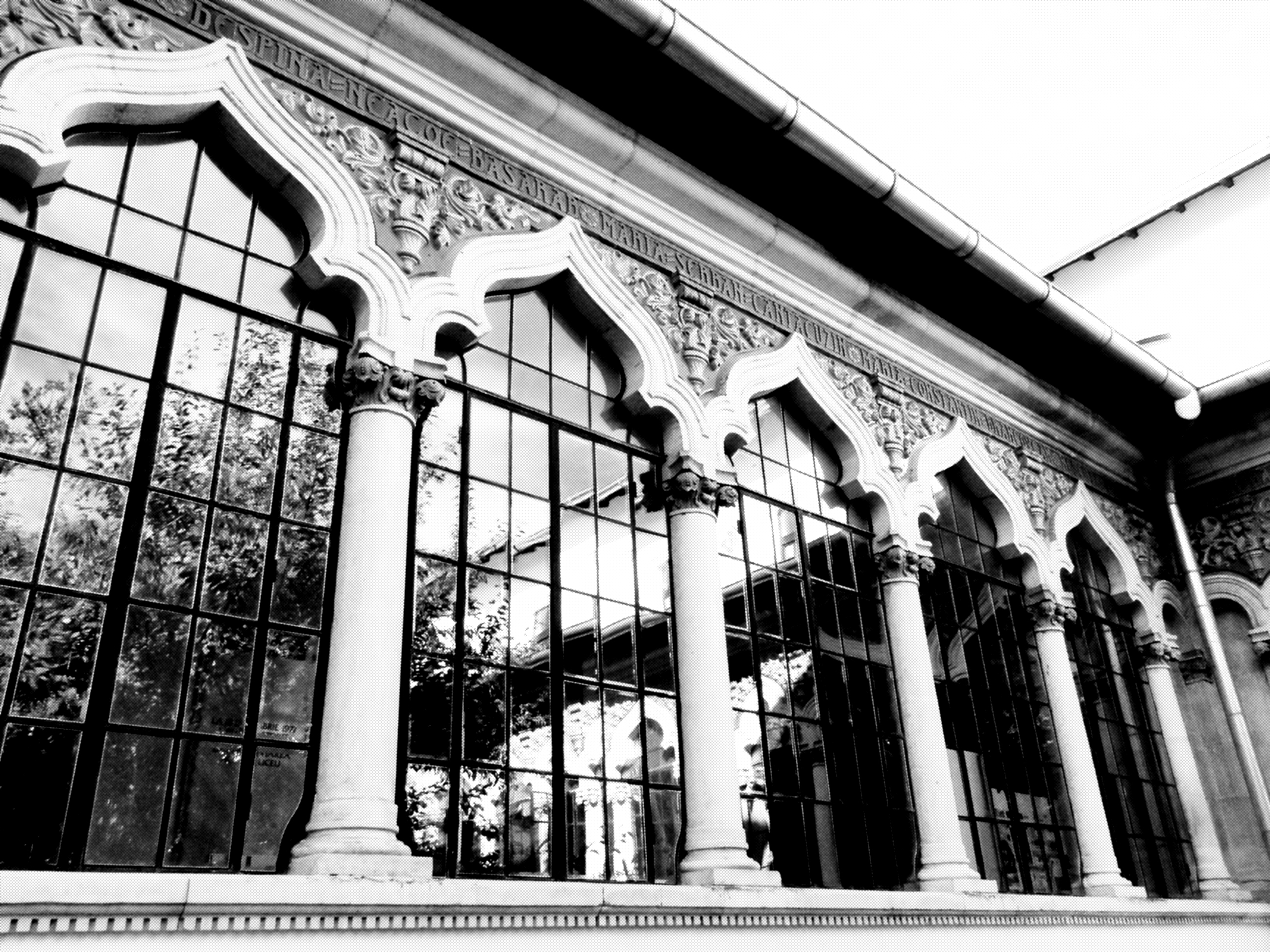 Școala Centrală de Fete